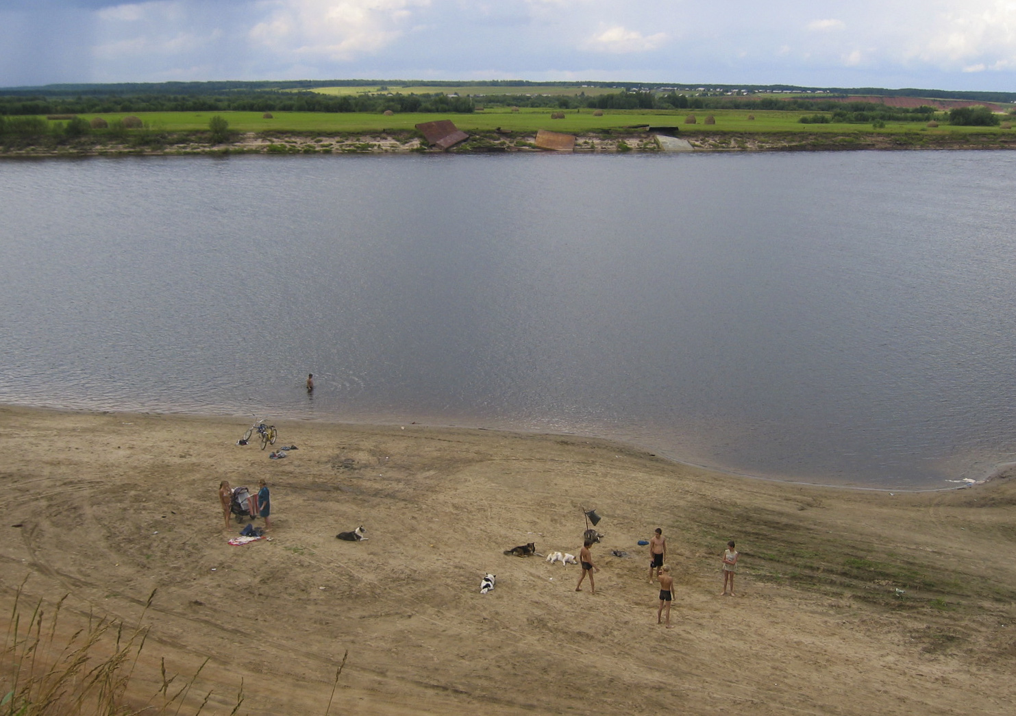 Leshukonskoye, Arkhangelsk Oblast, Russia, 164670